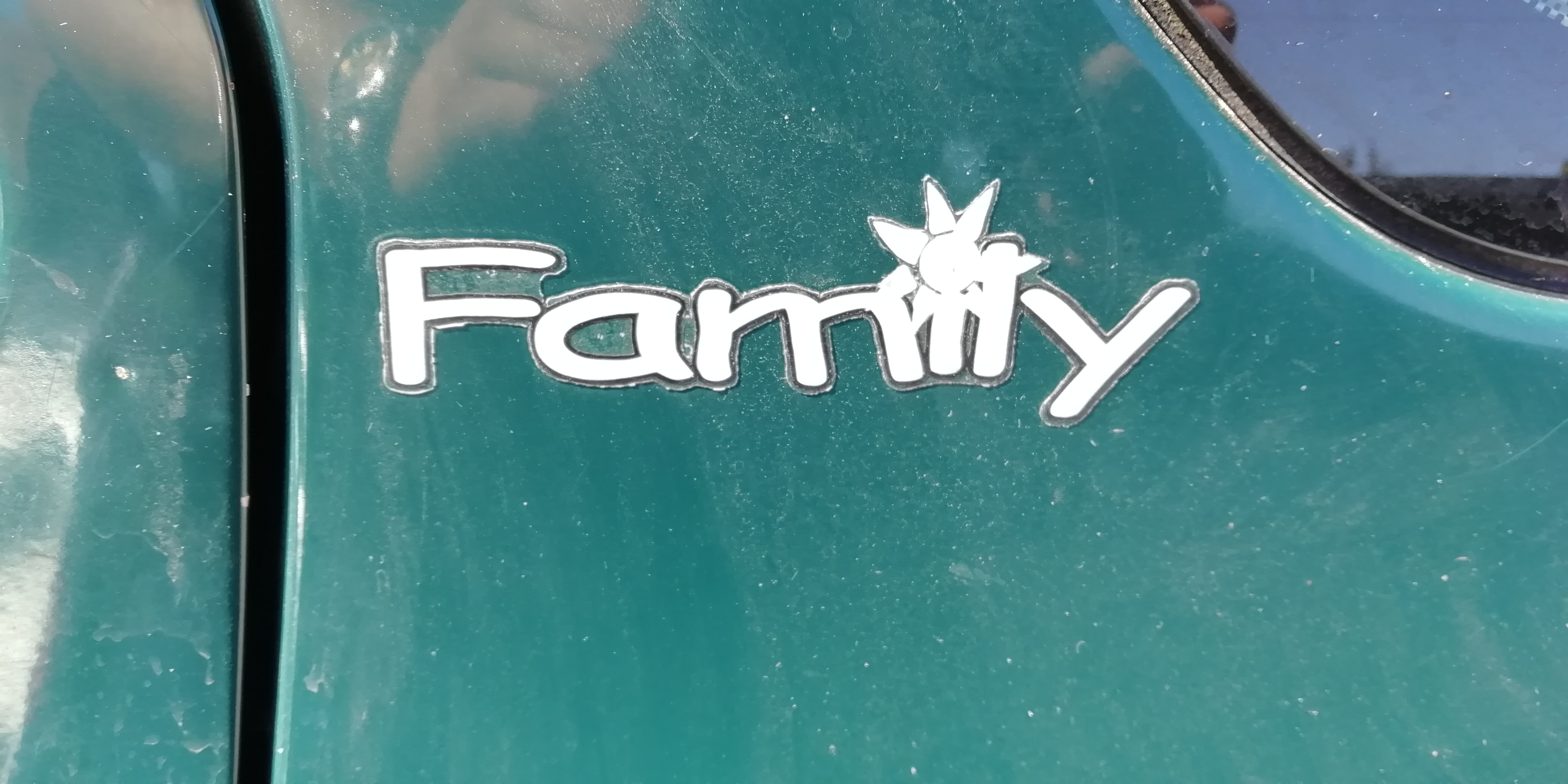 Škoda Felicia Family edition,HUAWEI,FIG-LX1,Brno